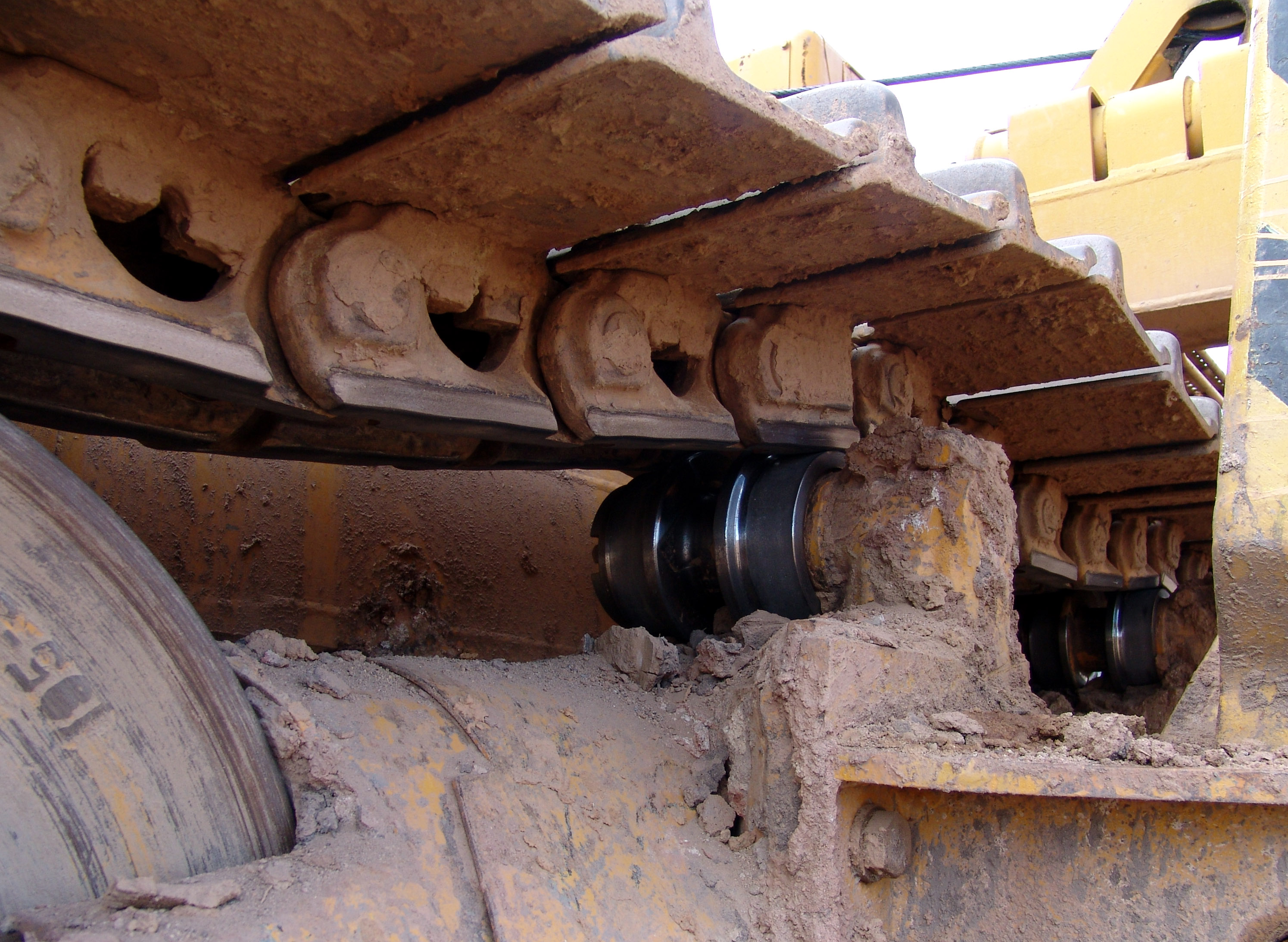 Komatsu Raupenkran